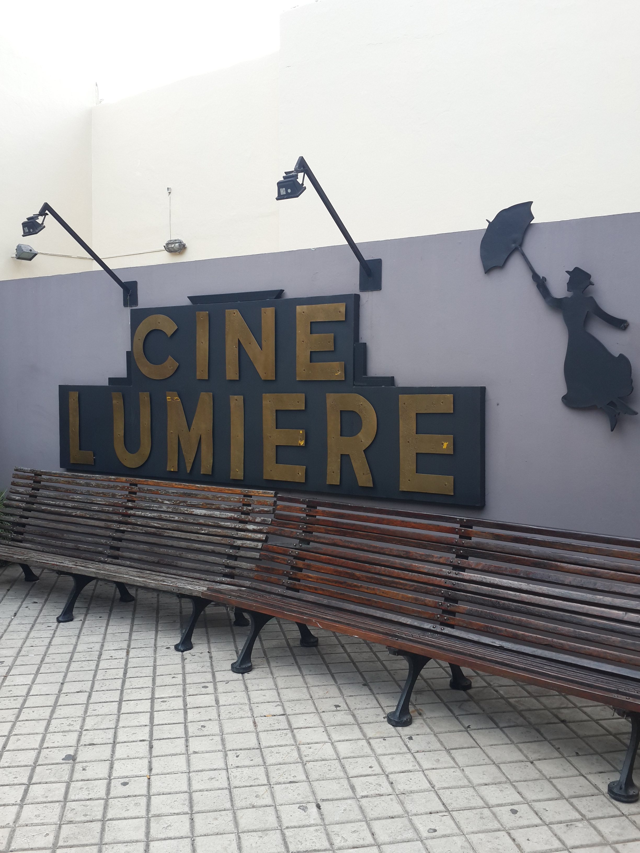 CENTRO CULTURAL CINE LUMIÈRE en Rosario, Argentina